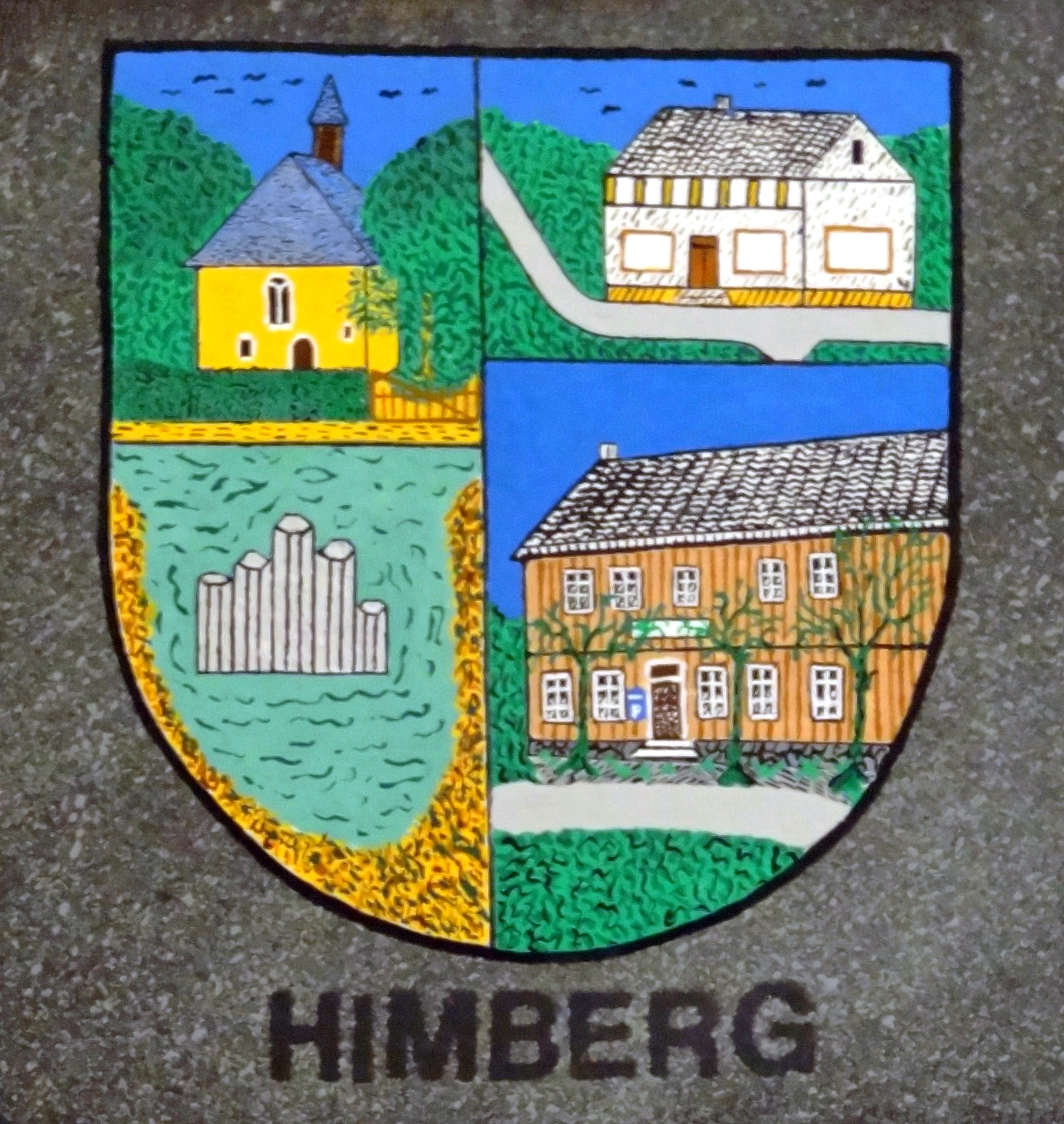 Schiefertafel als Ortswappen von Himberg, erstellt von Richard Lenzgen